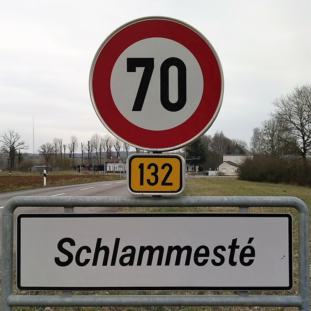 Schlammestee, commune de Weiler-la-Tour. La panneau se trouve sur le CR158, mais indique erronément CR132.